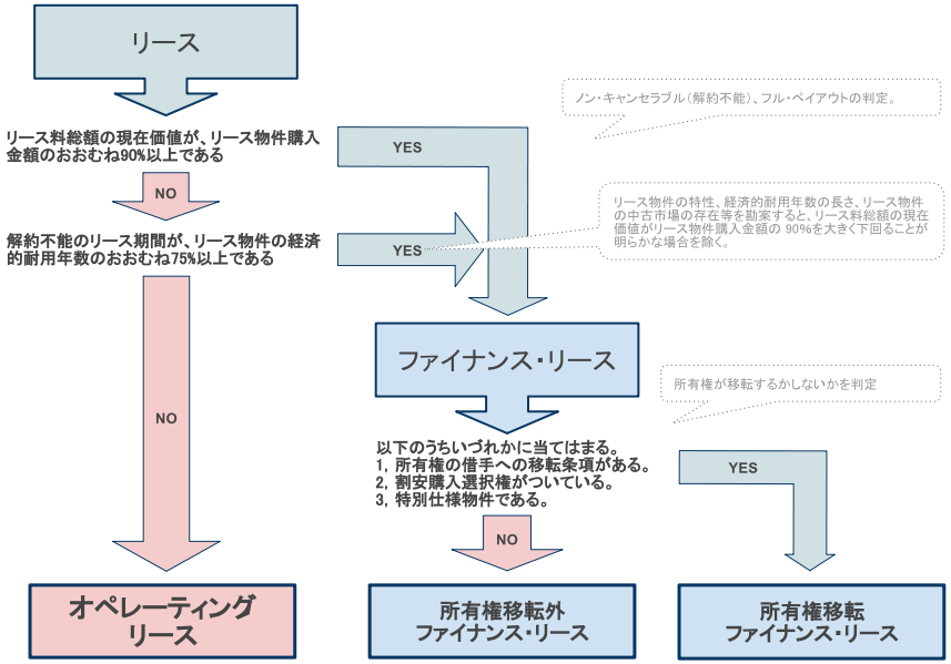 企業会計基準委員会によるリース取引に関する会計基準の適用指針（2007年3月30日改正）を元に作成したリース会計基準フローチャート。